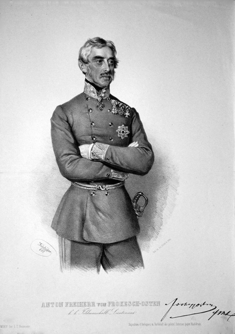 Anton von Prokesch-Osten, Lithographie von Josef Kriehuber, 1855